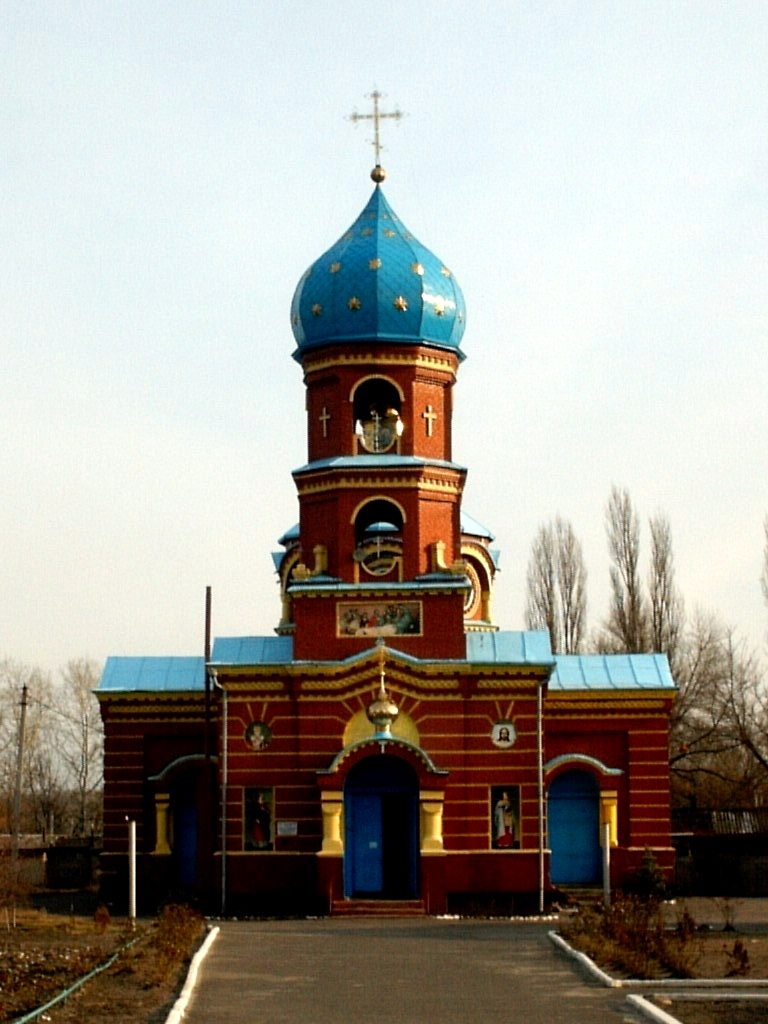 Цррковь в г. Счастье